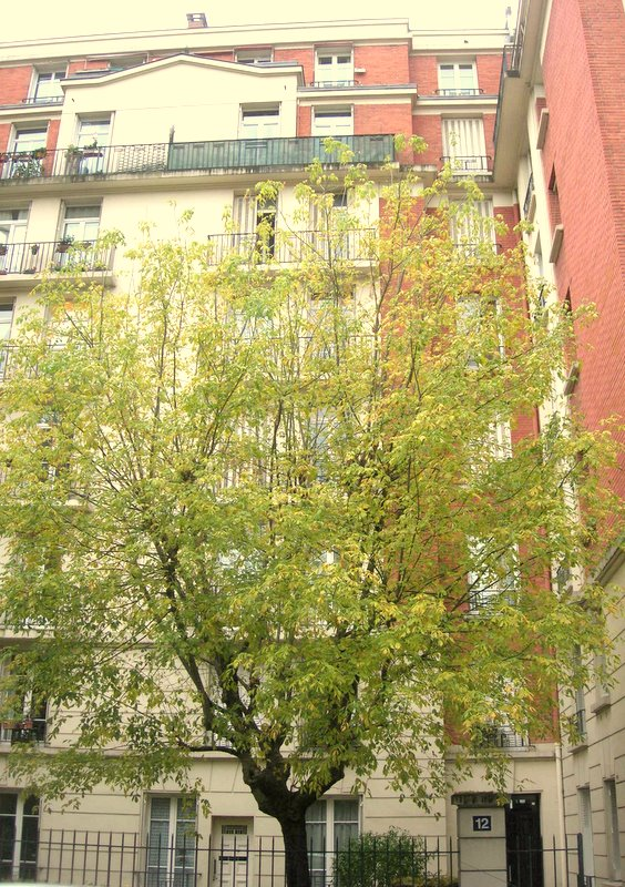 Maison de l'écrivain français Claude Aveline au 12 rue Théophraste Renaudot, Paris 15ème, France